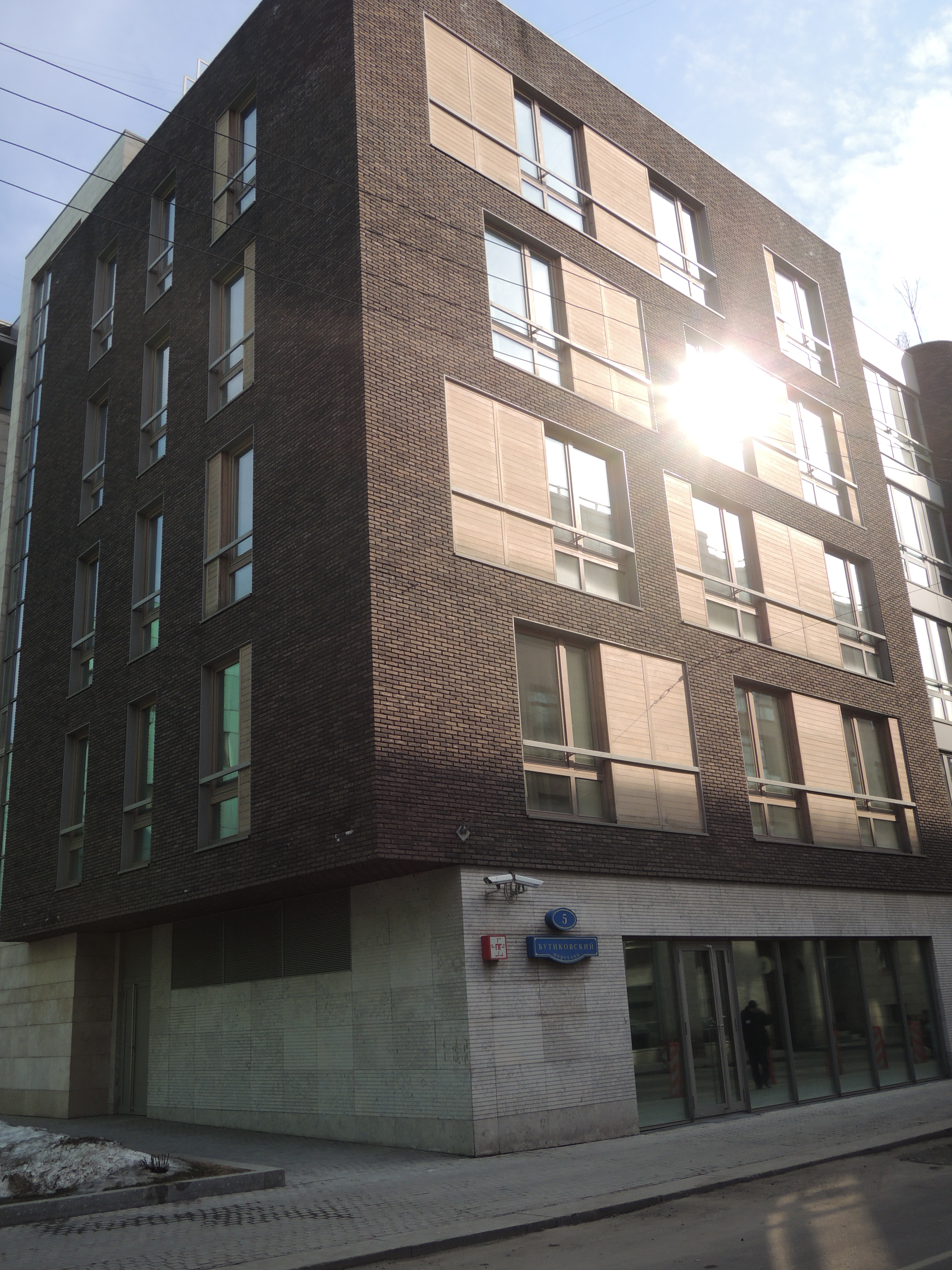 жилой комплекс «Бутиковский, 5» (2003, архитекторы С. Скуратов, К. Ходнев, В.Жеребцов, А. Шаруденко, М. Пелеева, Е. Анваер